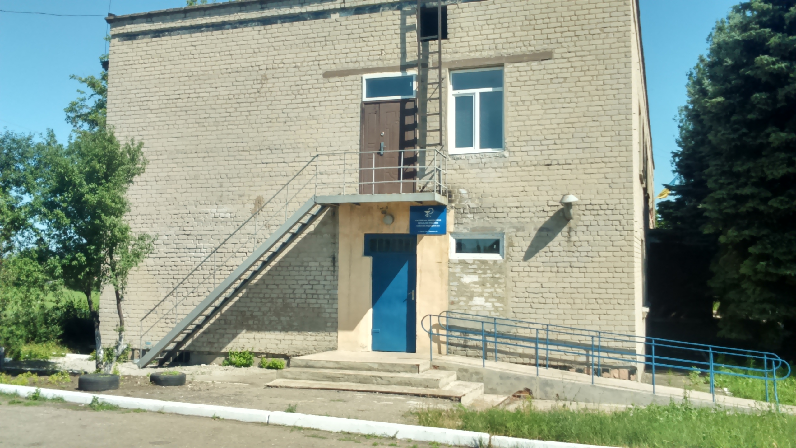 Світле — селище в Україні, Добропільському районі Донецької області, над річкою Водяна.